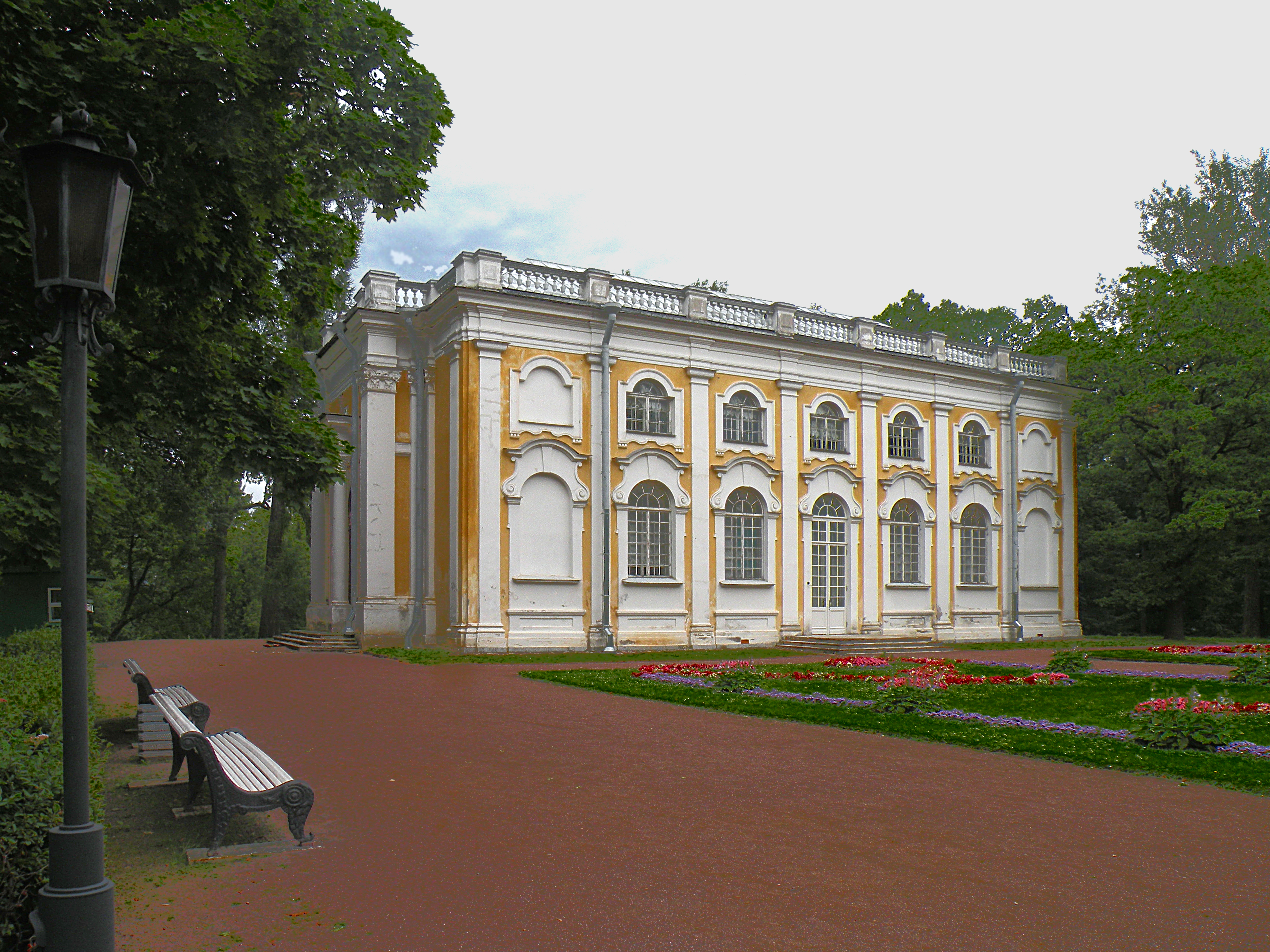 Kamennoje_zalo.Architect:Гофман Мартин Людвиг (1714 -1788)